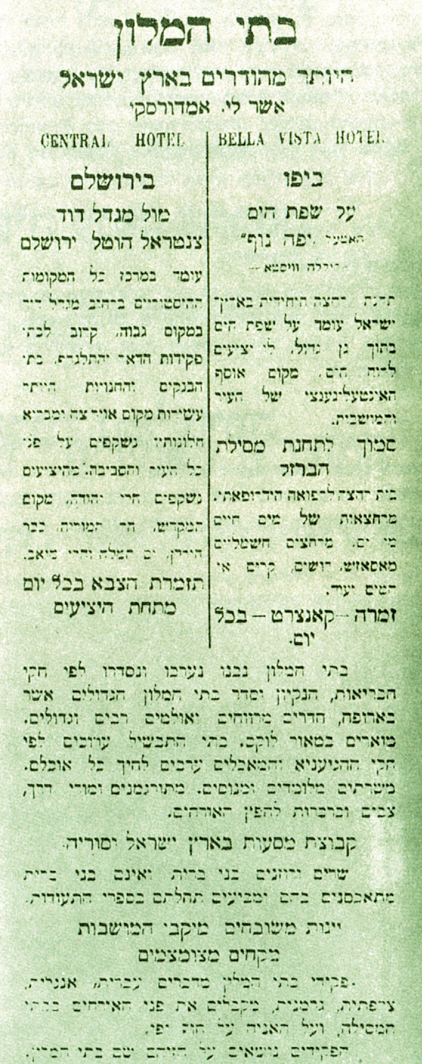 פרסומת למלון אמדורסקי בעיתון החרות ירושלים